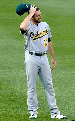 Ike Davis